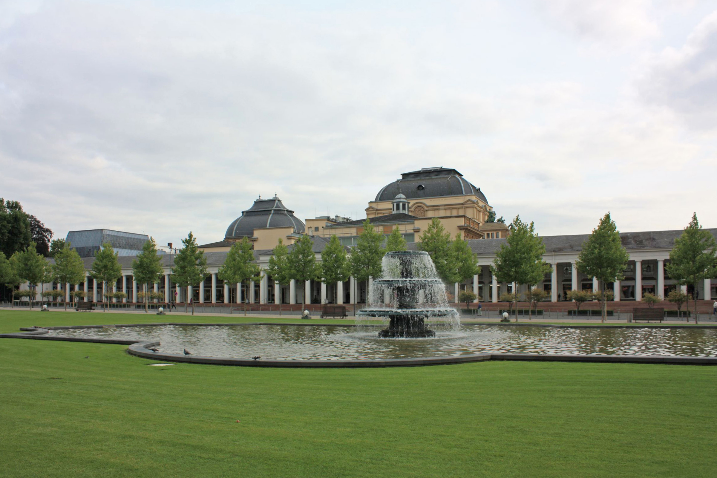 Außenansicht der „Neuen Kolonnade“ (Theaterkolonnade) am Bowling Green in Wiesbaden, Hessen. 1838-1839 nach dem Vorbild der „Alten Kolonnade“ von H. J. Zengerle von Baurat Carl Faber[1] erbaut; mehrfach umgebaut.